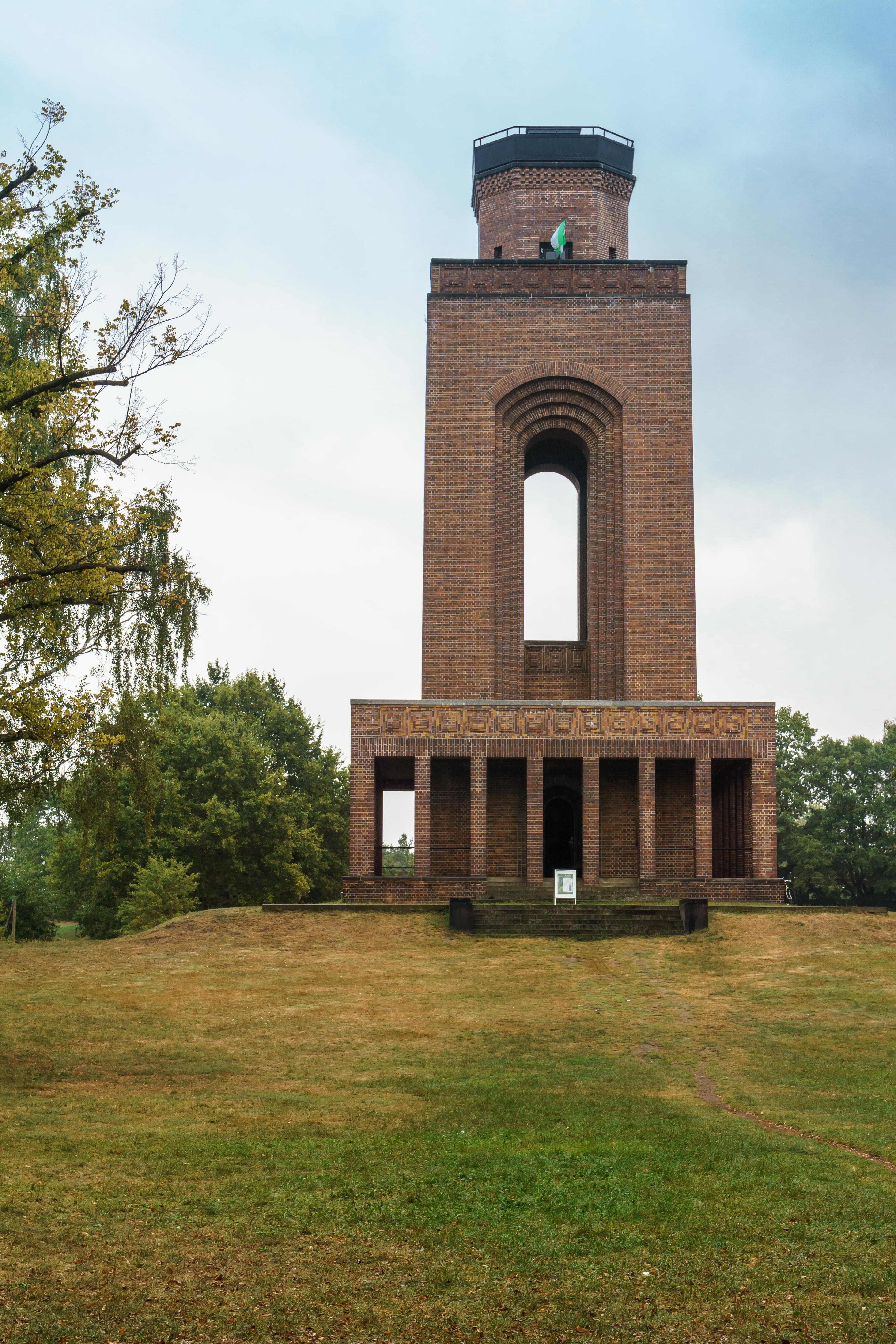 Bismarckturm auf dem Schlossberg in Burg (Spreewald)